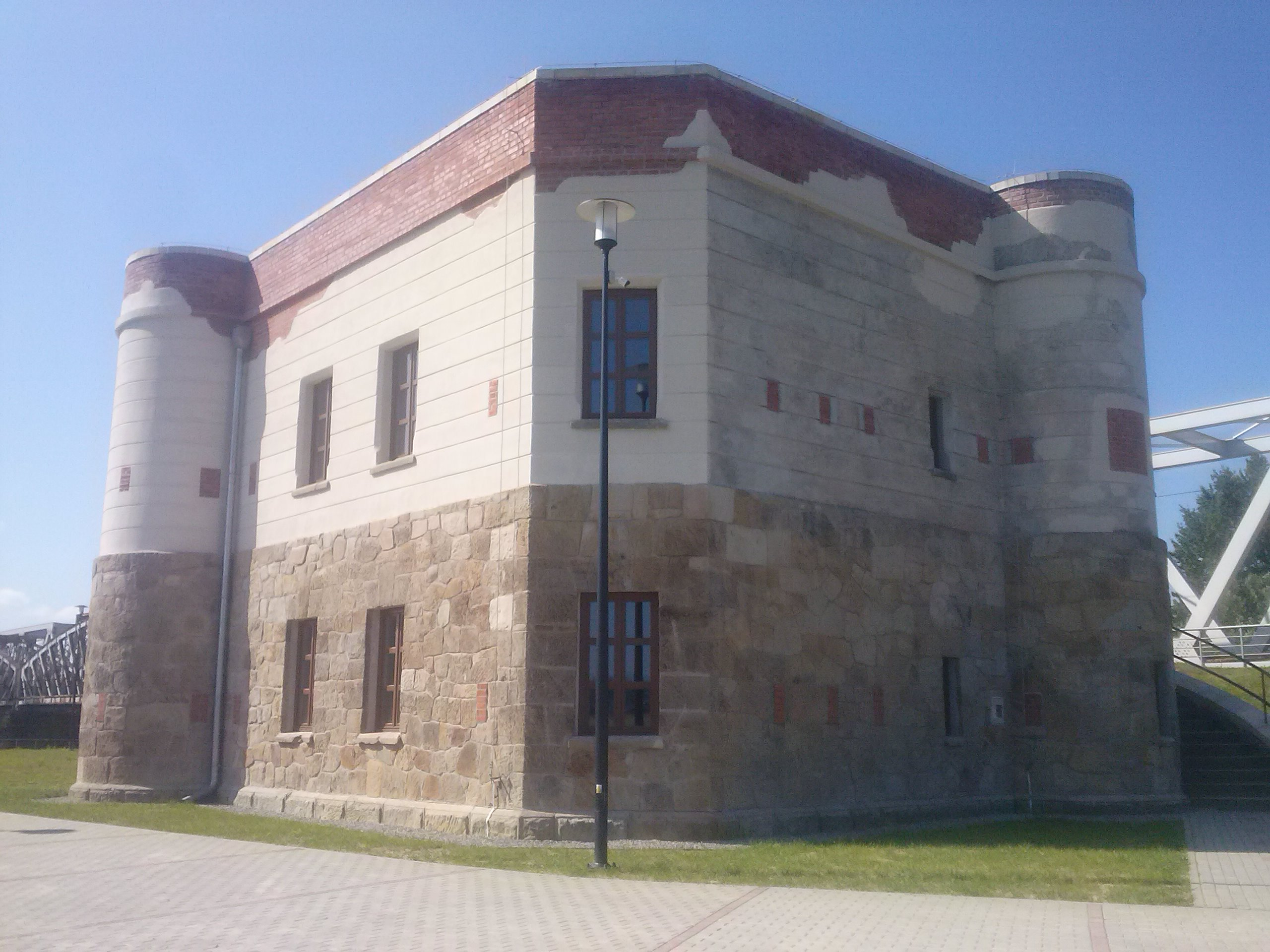 Strażnica kolejowa w Chodaczowie - obecnie własność Gminy Tryńcza, widok od czerwca 2019 po remoncie